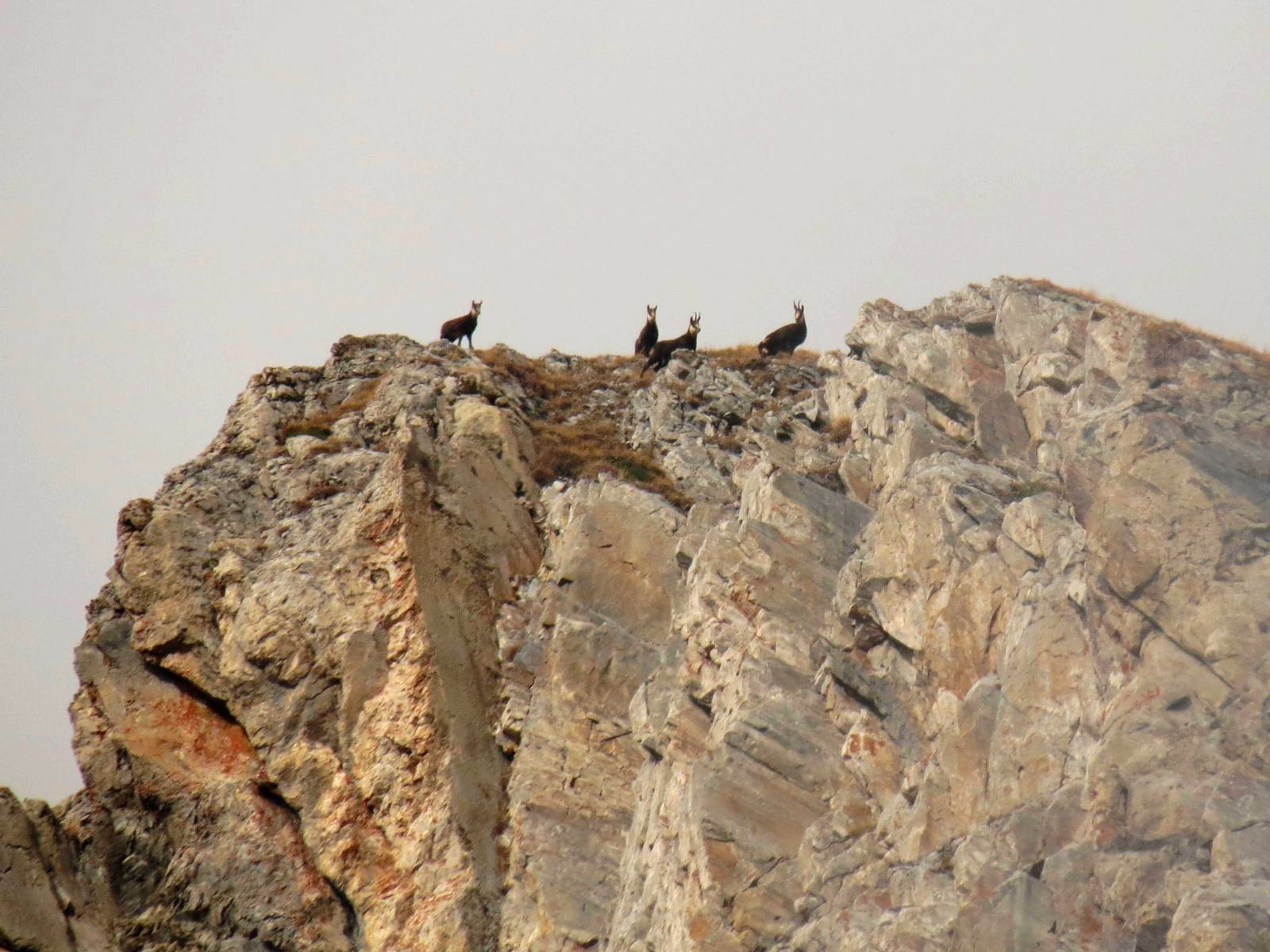 Пирин, Пирин